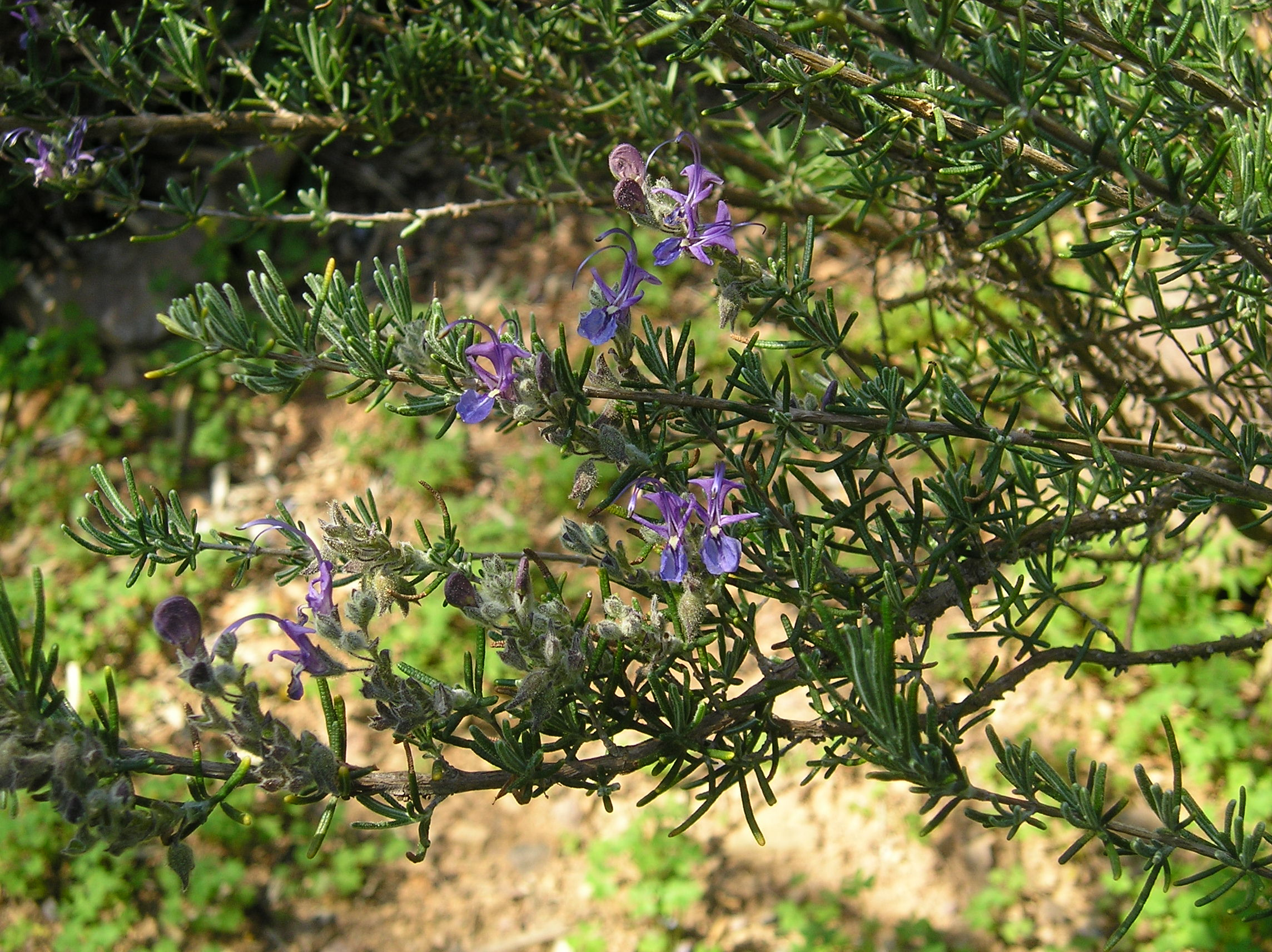 Rosmarinus eriocalix, Romarin à calice laineux (Espagne). Photographie : Jardin botanique de la ville de Nice